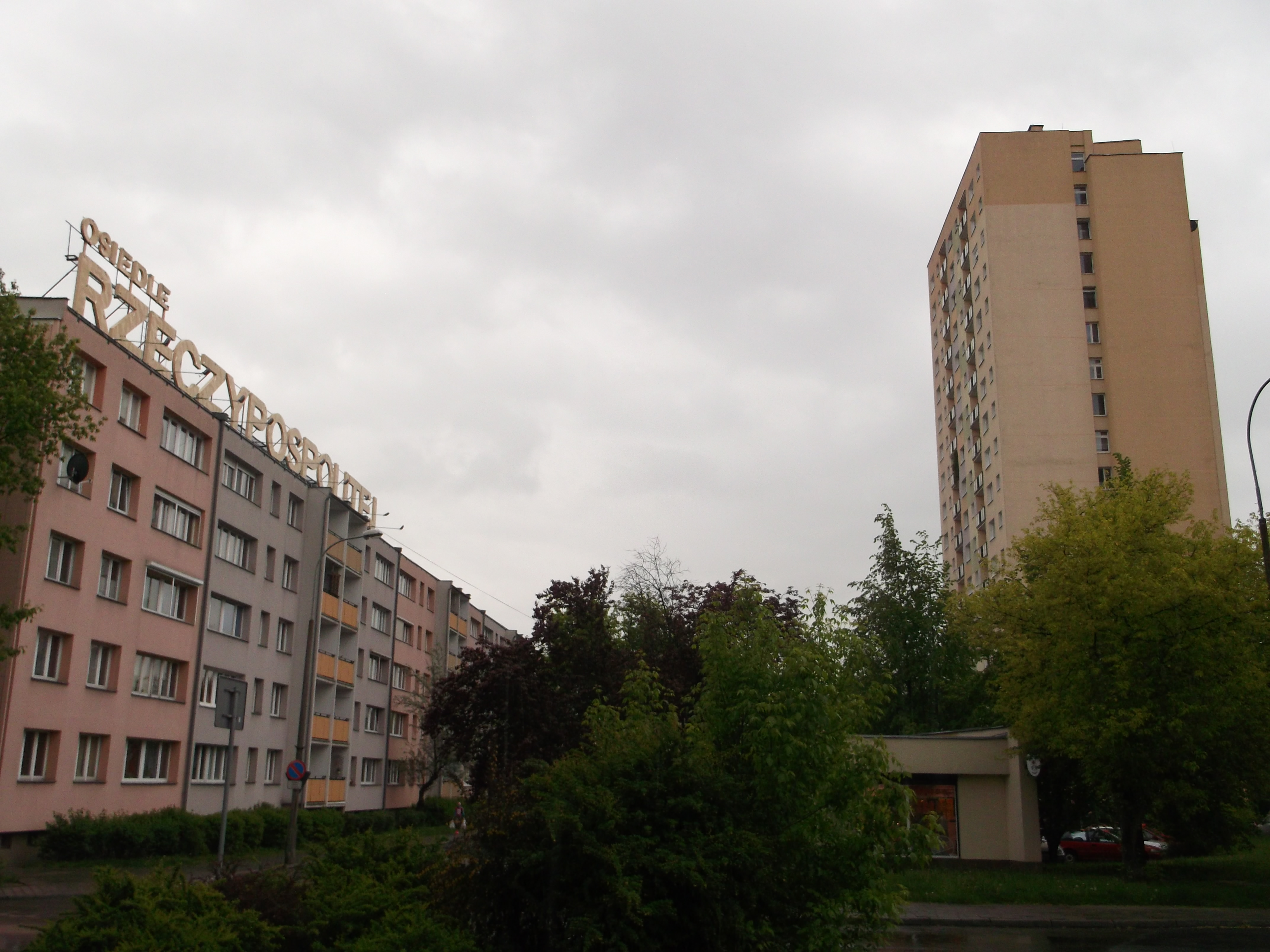 Osiedle Rzeczypospolitej w Poznaniu.